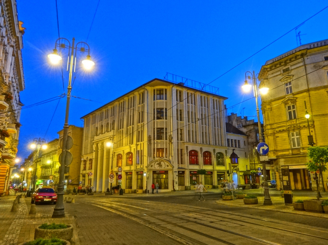 Dom Towarowy Jedynak, ul. Gdańska 15 w Bydgoszczy (zbud. 1910)